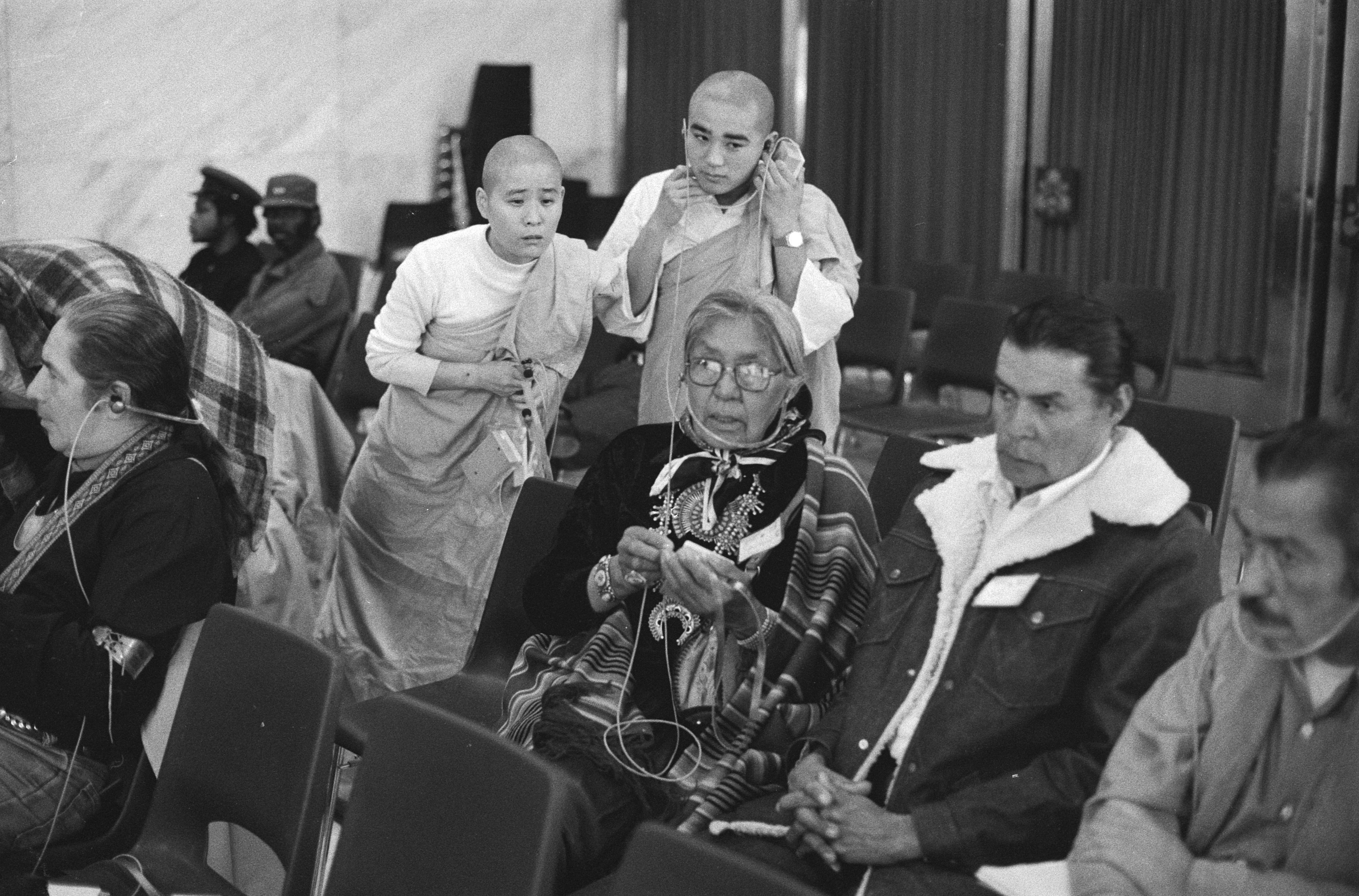 Collectie / Archief : Fotocollectie Anefo Reportage / Serie : [ onbekend ] Beschrijving : Vierde Russel Tribunaal over rechten Indianen in Amerika in De Doelen te Rotterdam, Navajo-indianen met Boeddhistische monniken Datum : 24 november 1980 Locatie : Rotterdam, Zuid-Holland Trefwoorden : INDIANEN, MONNIKEN Instellingsnaam : Doelen, De, Russell-Tribunaal Fotograaf : Bogaerts, Rob / Anefo Auteursrechthebbende : Nationaal Archief Materiaalsoort : Negatief (zwart/wit) Nummer archiefinventaris : bekijk toegang 2.24.01.05 Bestanddeelnummer : 931-1661 Reacties Geplaatst door Maaike op 06 januari 2014 - 16:57. Met in het midden Roberta Blackgoat. Persoonsnamen: Roberta Blackgoat.